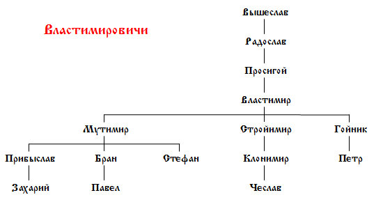 Генеалогическая таблица династии Властимировичей